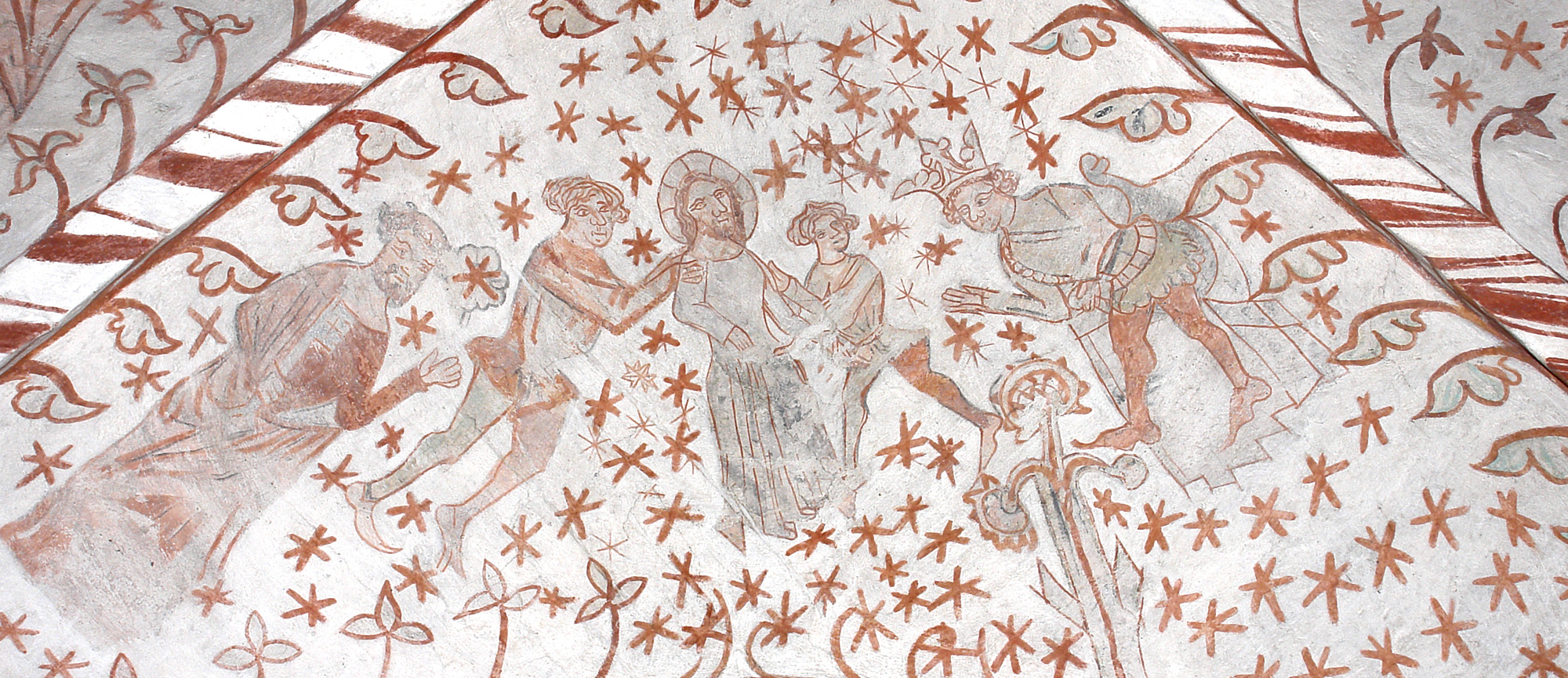 Kirche von Nødebo, Dänemark (Nord-Seeland). Fresken im spätromanischen Stil von 1425, ausgeführt von einem Künstler, der für die langen Nasen seiner Personen bekannt ist. Fresko Ostseite des Schiffes, Bogen: thronender Pilatus oder Herodes mit Christus vor ihm